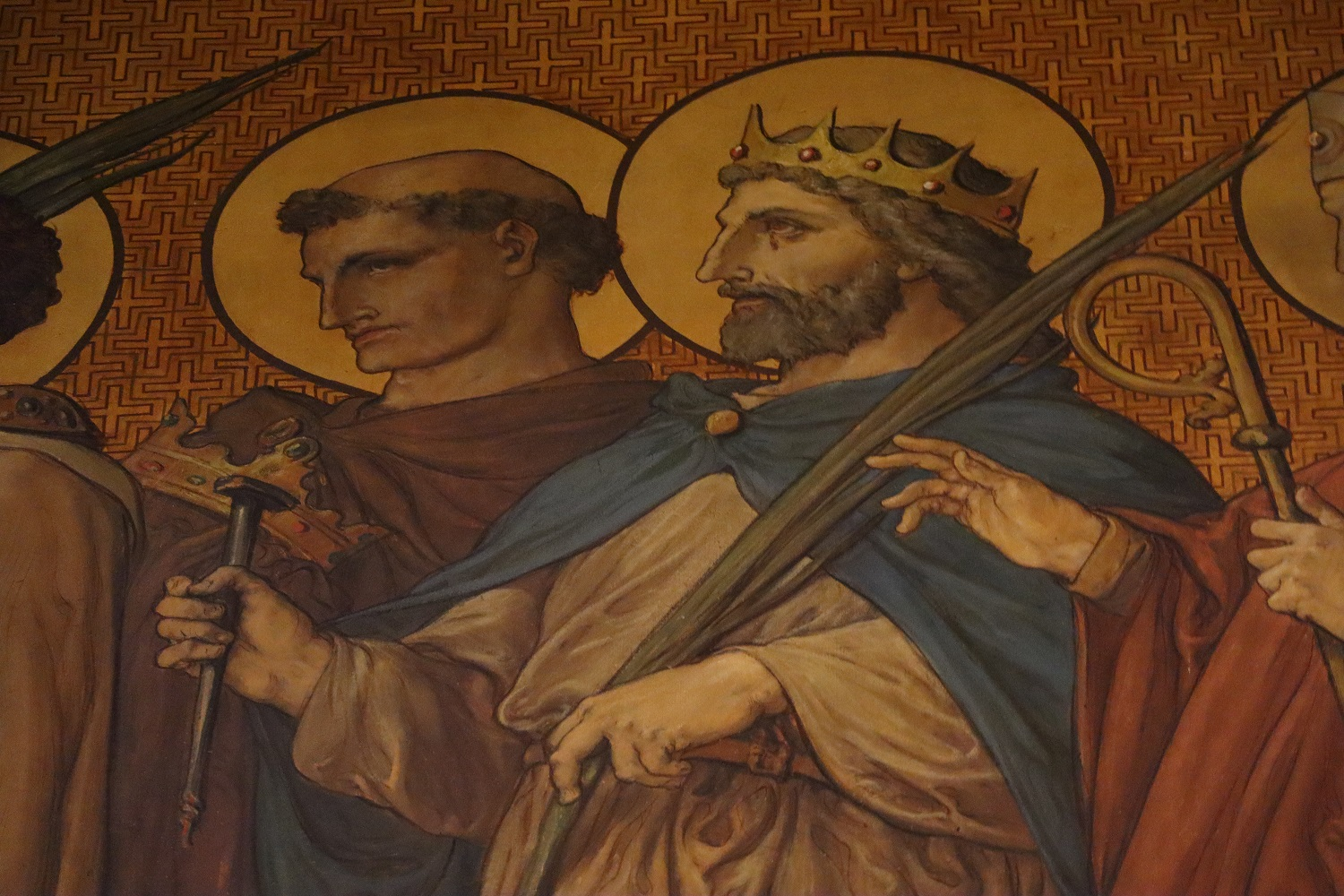 Saint Judicaël et Saint Salomon. Procession des saints de Bretagne. Diocèse de Rennes. Déambulatoire de la métropole Saint-Pierre de Rennes (35).